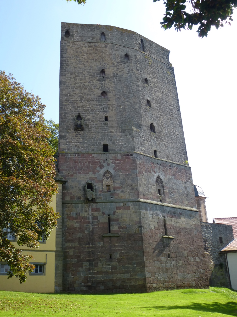 Turm der Burg Adelebsen , Blick von NO (Feldseite)